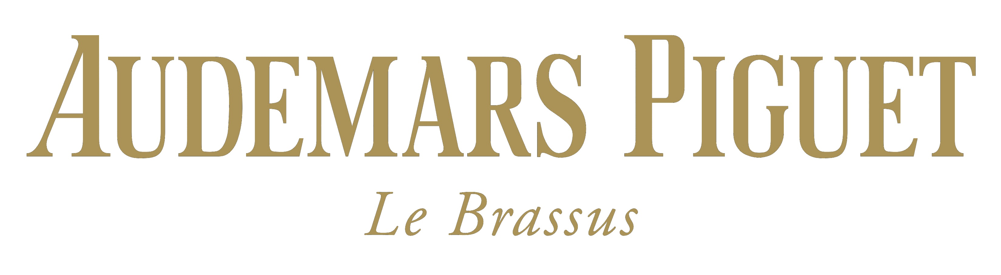 Logo Audemars Piguet